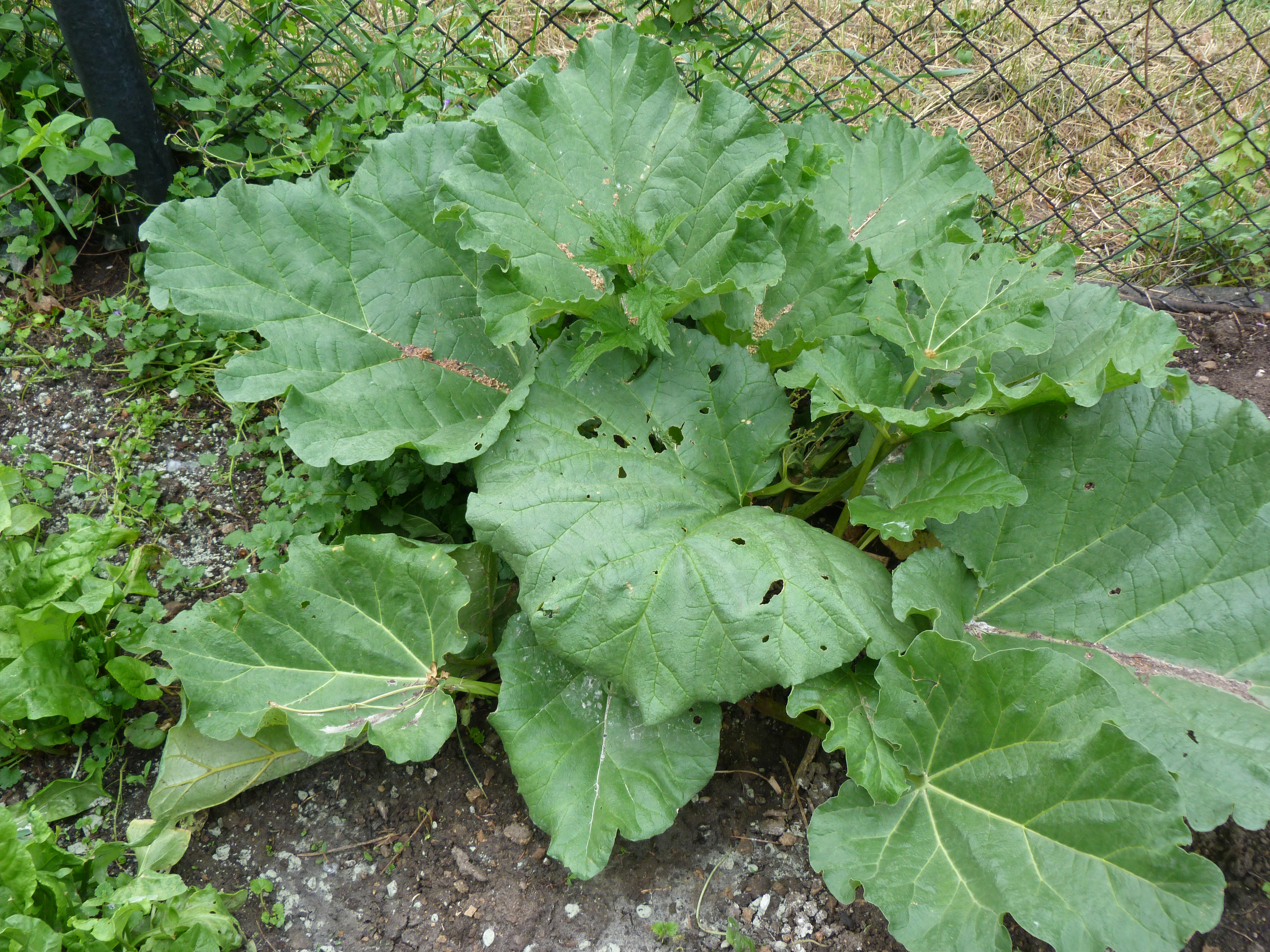 Rebarbara. A felvétel 2012. május 9 –én, szerdán készült Budapesten, Budán. Megjelent Creative Commons alatt a Metapolisz DVD sorozatban. Published under Creative Commons in the Metapolisz DVD line.